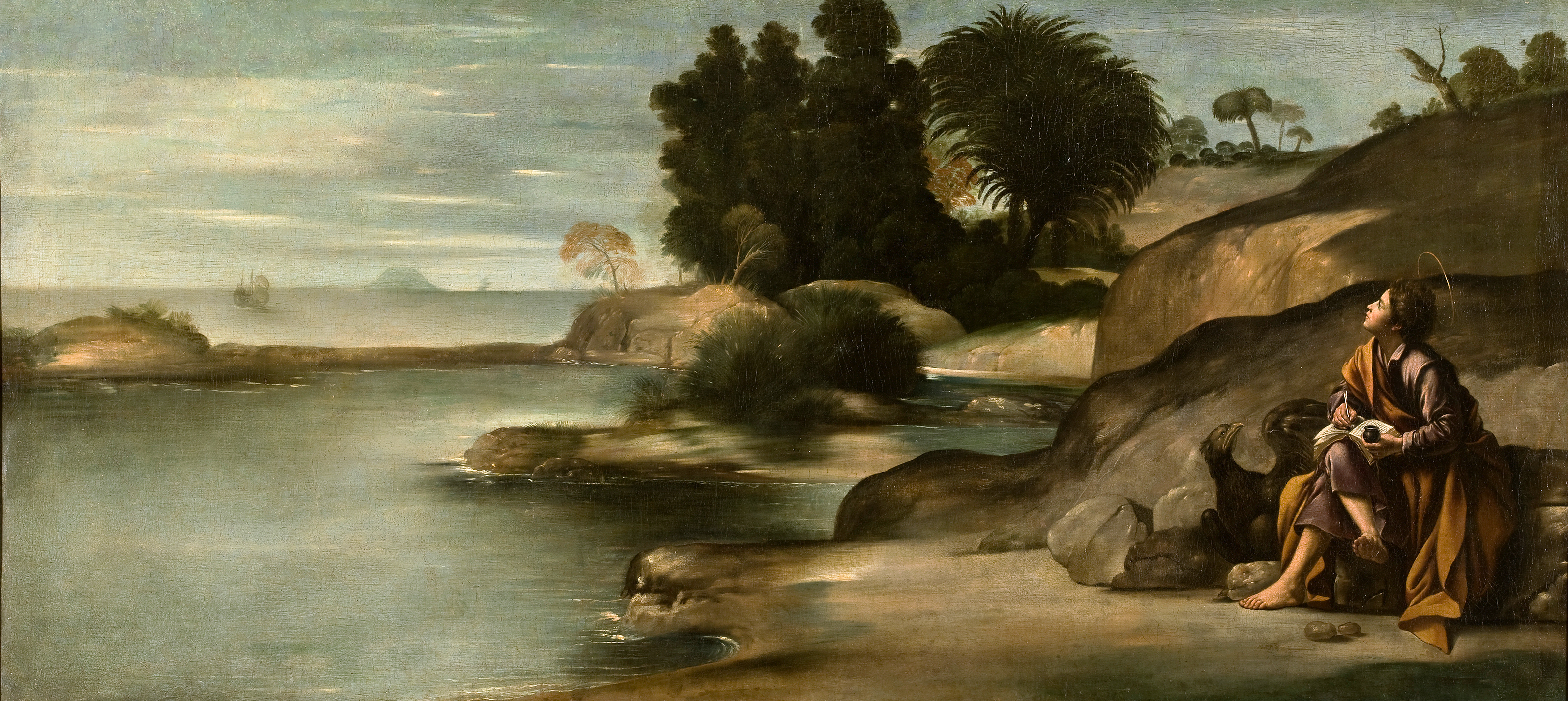 Paisaje con San Juan Evangelistalabel QS:Les,"Paisaje con San Juan Evangelista"